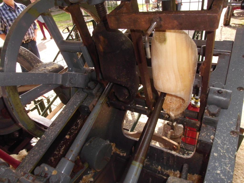 Holzschuhherstellung mit Unterstützung einer Dampfmaschine